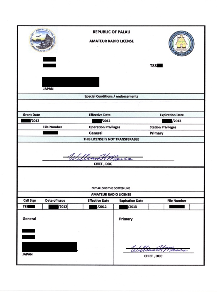 パラオ政府発行のレディオライセンス（無線局許可証）